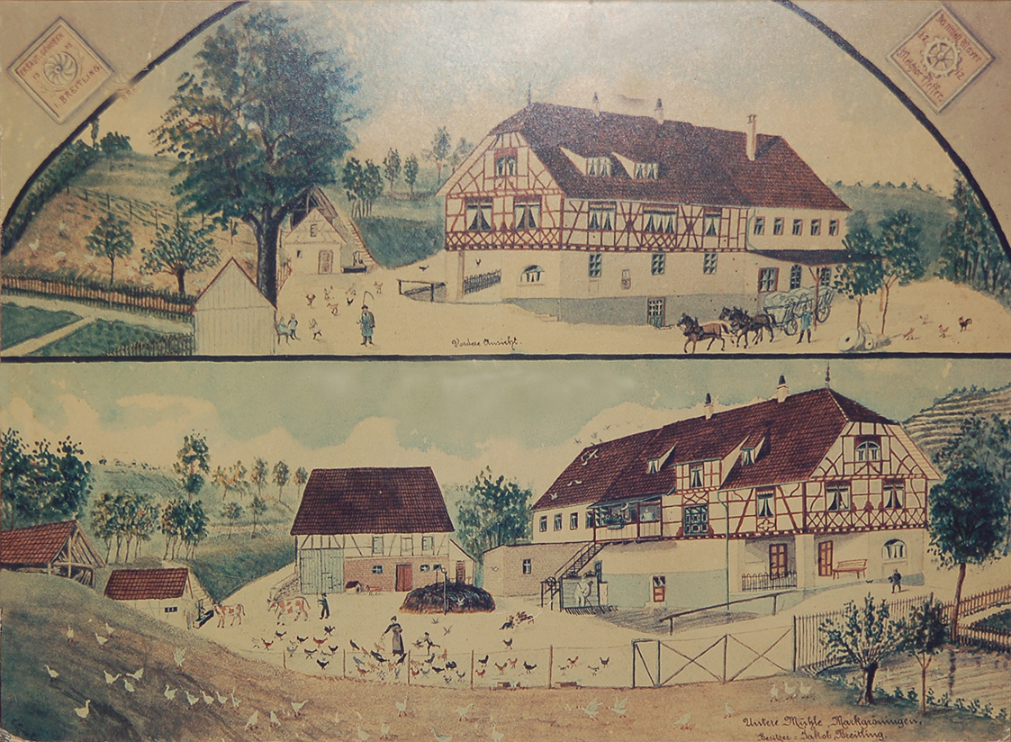 Untere Mühle bei Markgröningen nach 1903; Vorder- und Rückseite. Grundstein links: Erbaut und gehoben 1903 – J(akob) Breitling. Rechts: Danniell Mayer – 1712 – Melchior Pfeffer.